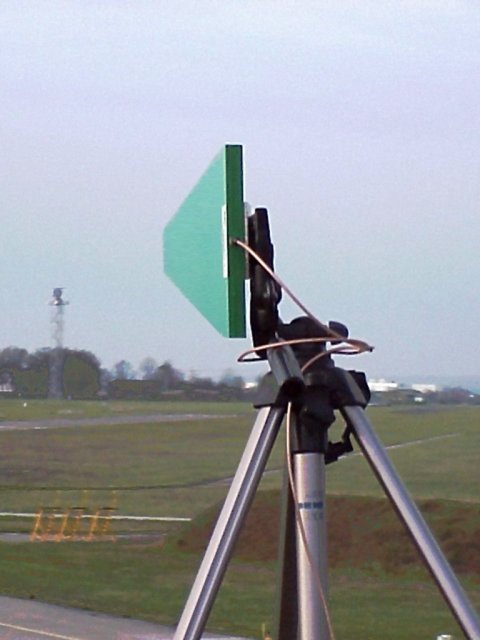 Eine Messantenne (LPDA) empfängt die Radarimpulse